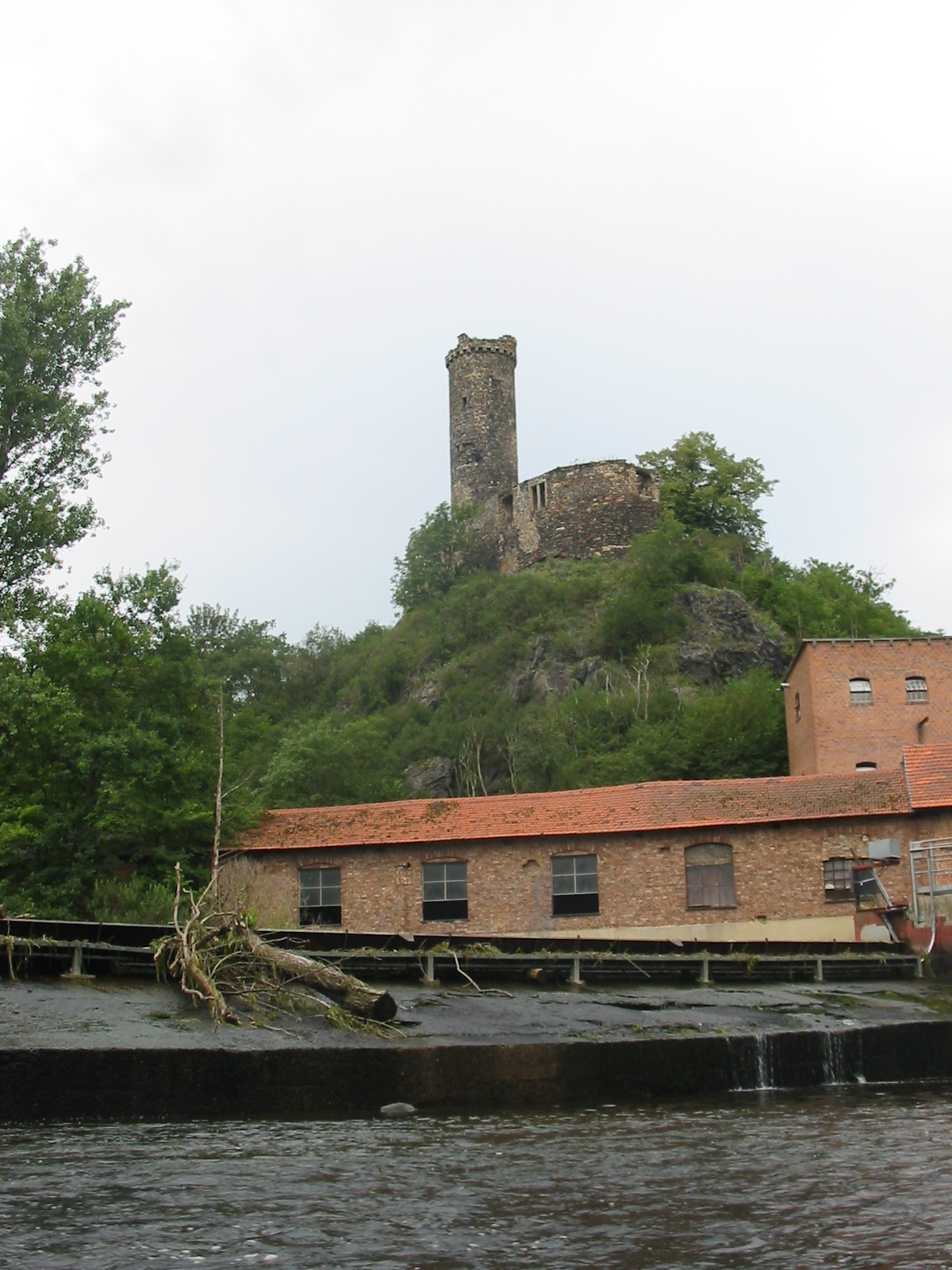 Burgruine Altenburg in Felsberg (Hessen), Deutschland